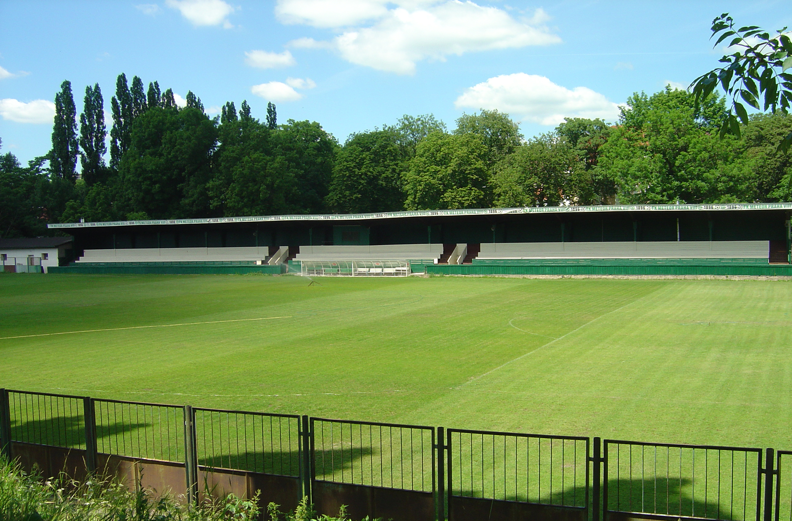 Stadion des Prager Fußballklubs FK Meteor Praha VIII